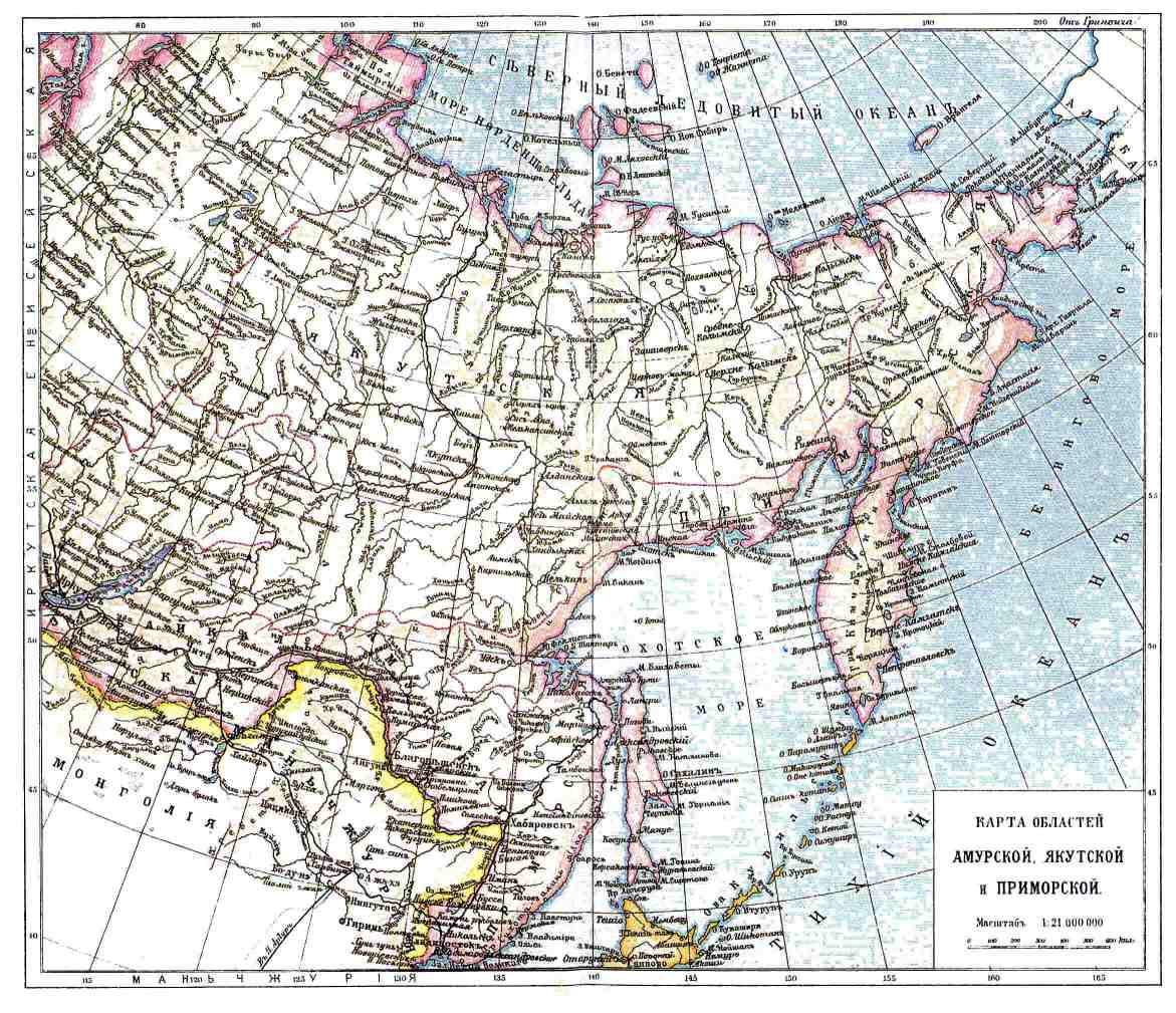 Карта Якутской, Амурской и Приморской областей Российской Империи, начало 20 века